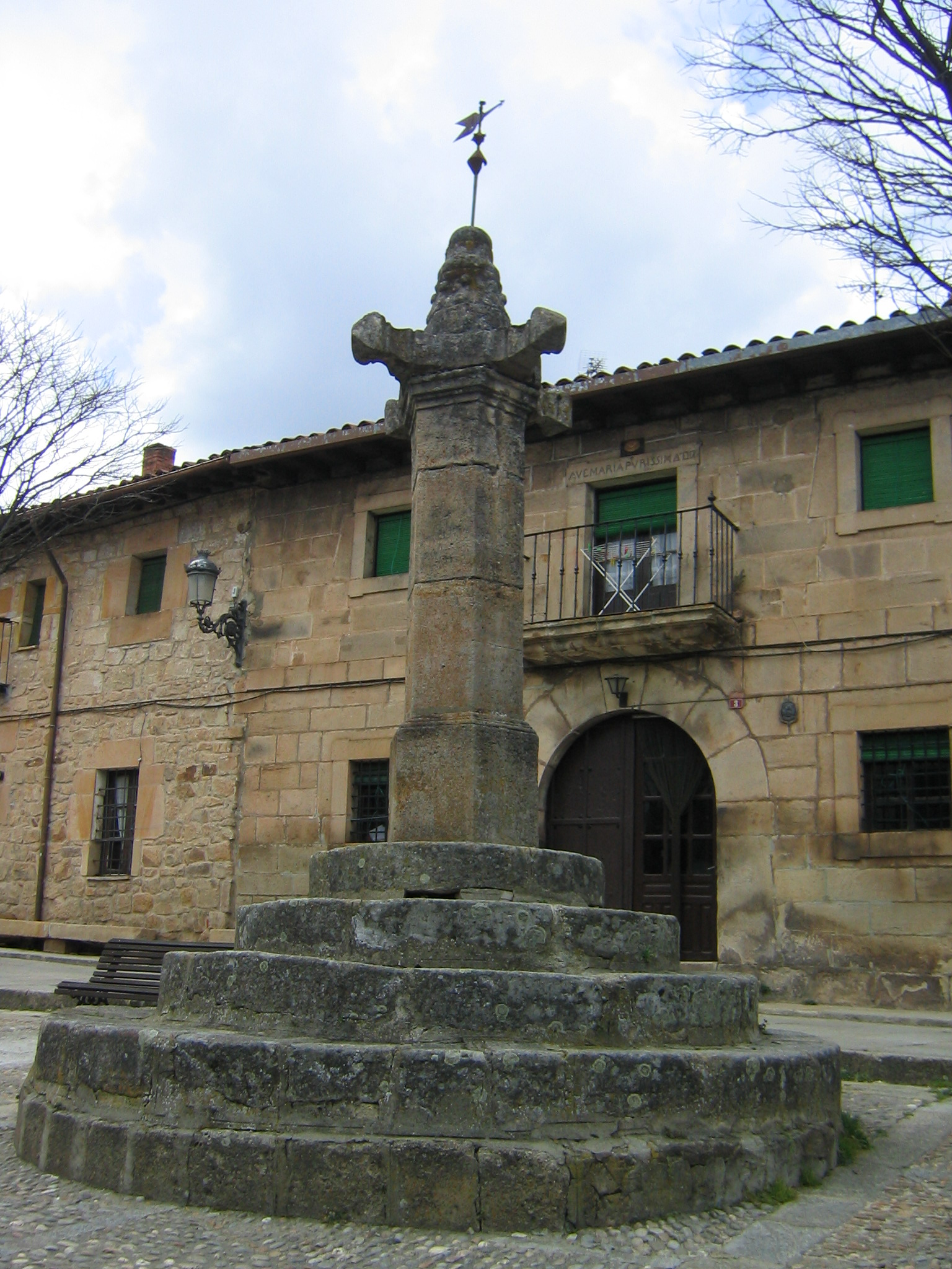 El rollo en Vinuesa, Soria (Castilla León) (España).